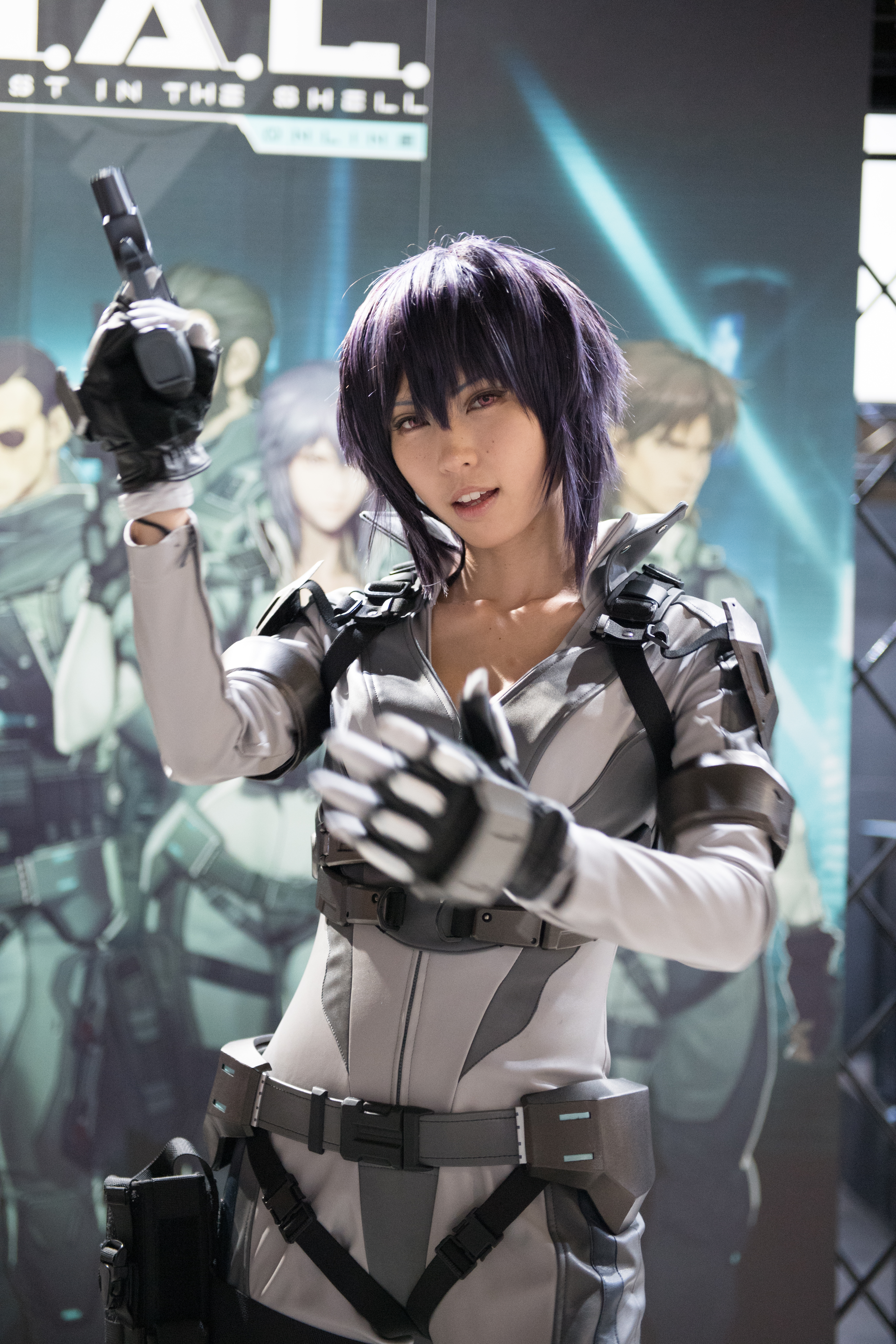 20160915-DSC_8656